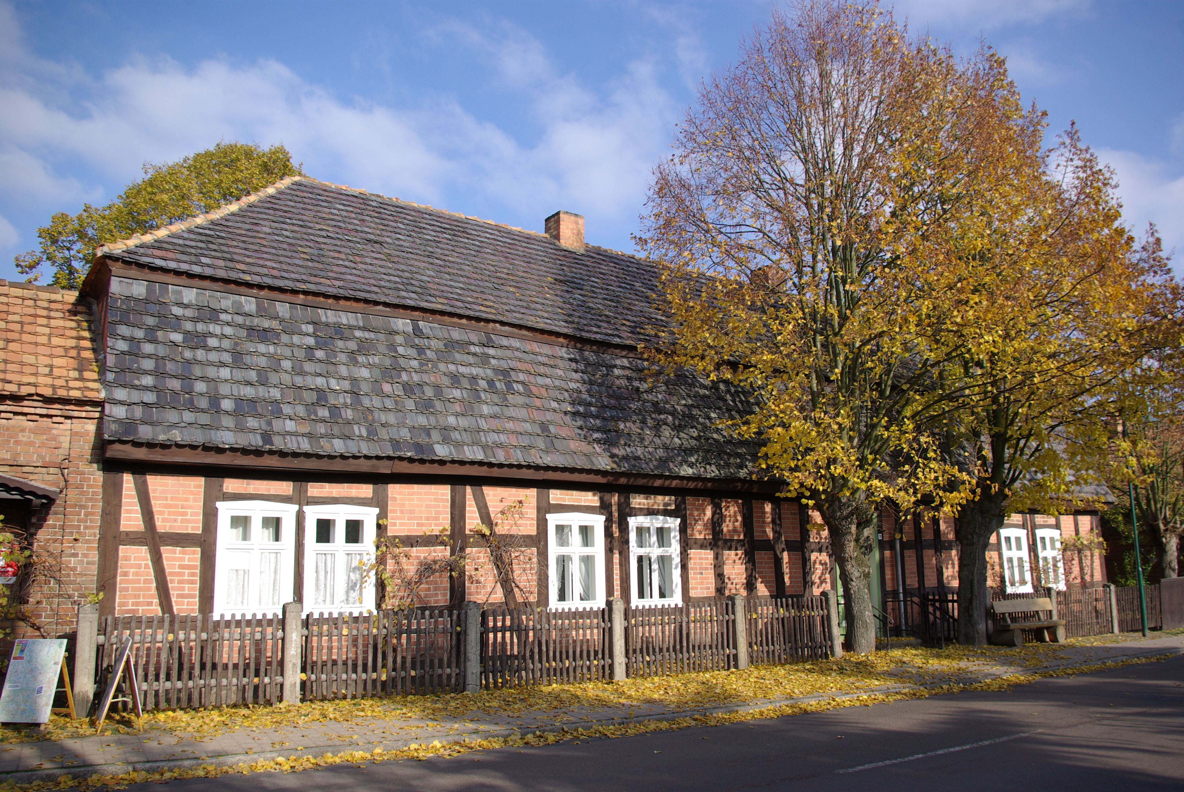 Schlezig in Brandenburg. Das Haus beinhaltet das Bauernmuseum. Das haus steht unter Denkmalschutz.